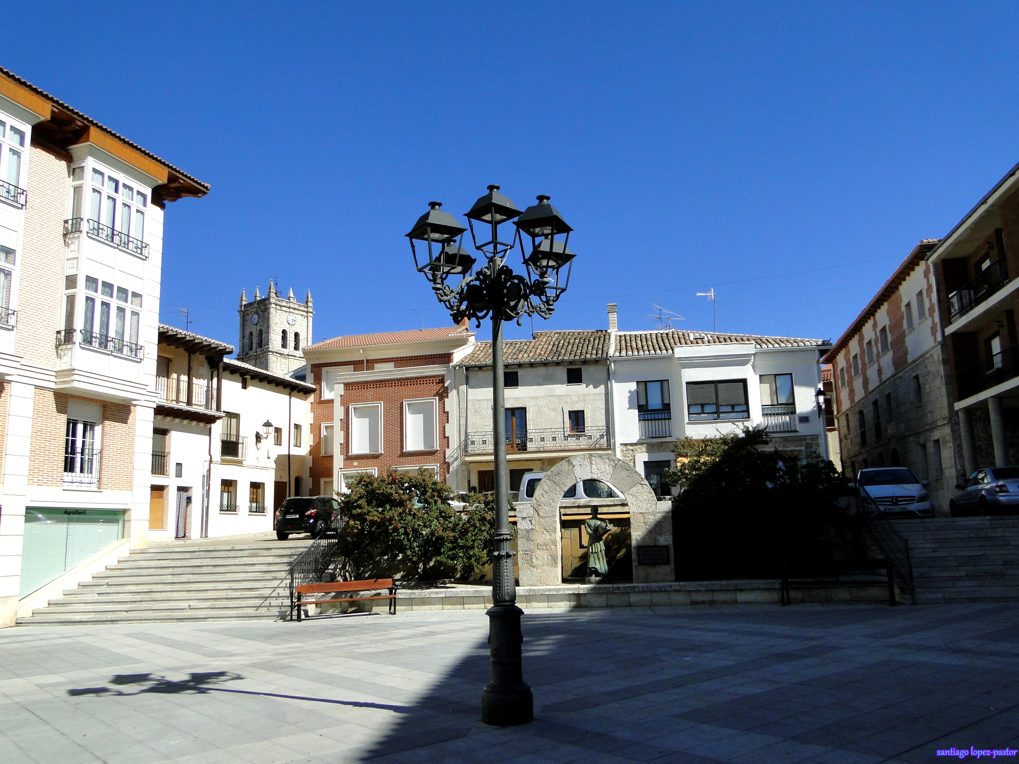 Baltanás